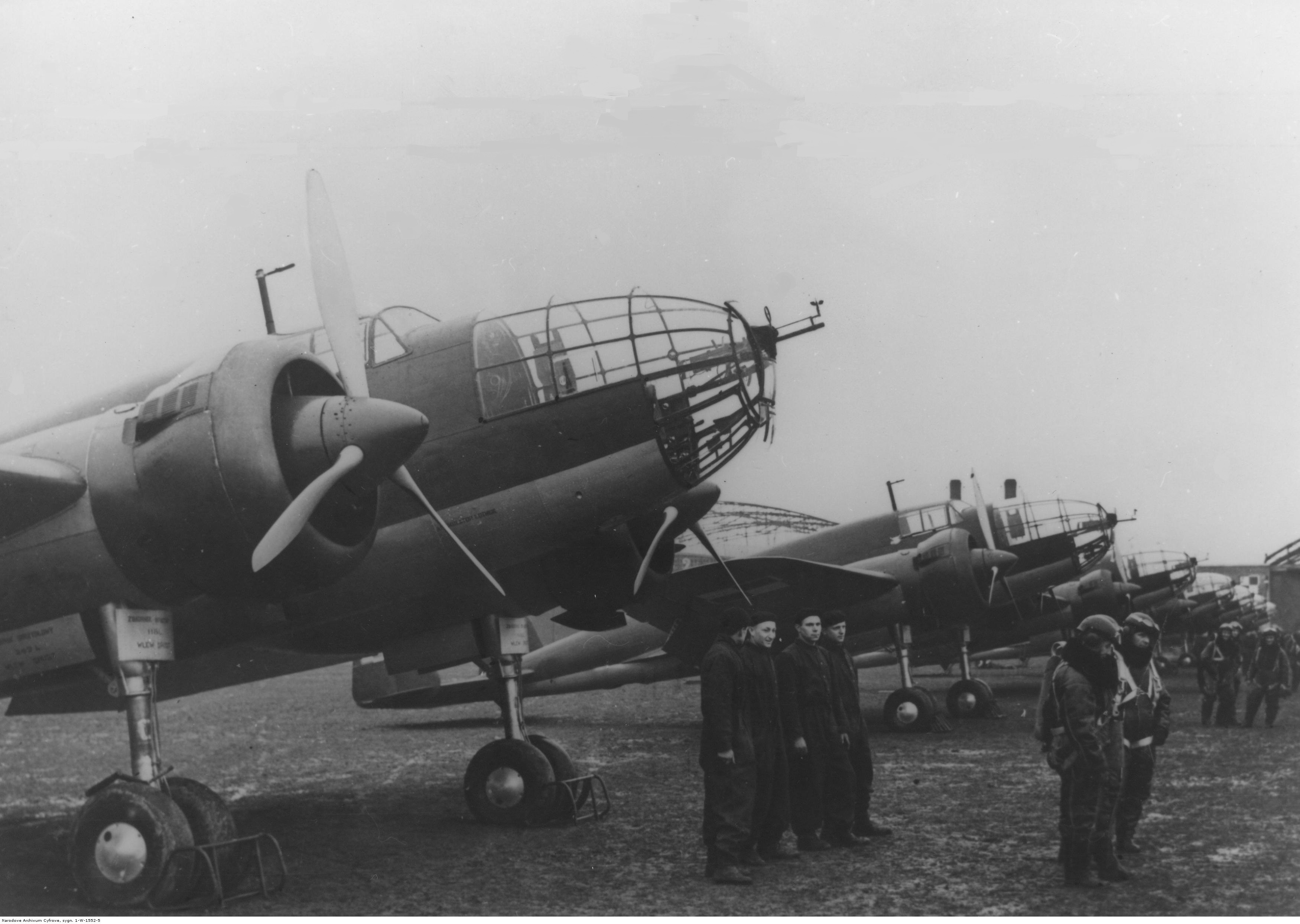 Załogi samolotów PZL.37 Łoś przy maszynach.